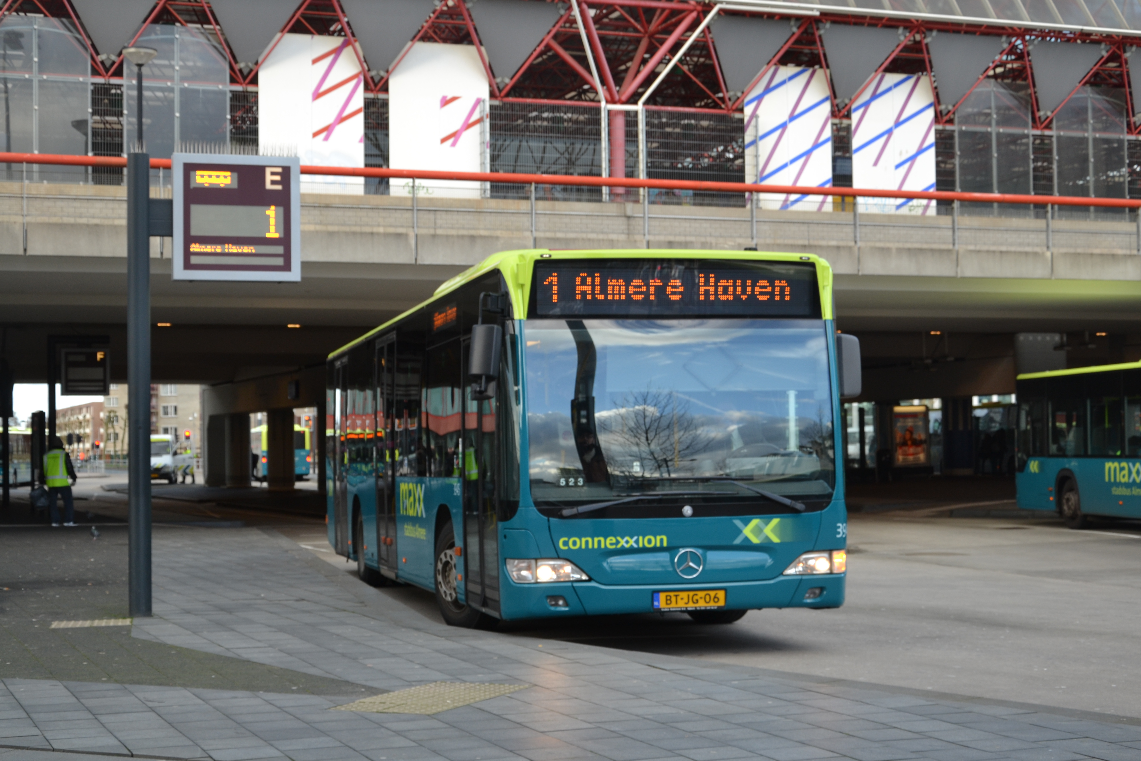 Sinds een paar weken wordt er door Connexxion met materieel geschoven in het noorden van de Randstad. Als gevolg daarvan zijn een aantal Citaro's van het Schiphol Sternet groen gespoten voor de Almeerse stadsdienst. Een vreemde eend in de bijt vormen nu dus de drie standaardcitaro's in Almere, die ondanks hun kortere lengte op dezelfde lijnen worden ingezet als de 18-meter citaro's. Op de foto is de 3945 te zien, die veels te vol vertrekt richting Almere-haven.